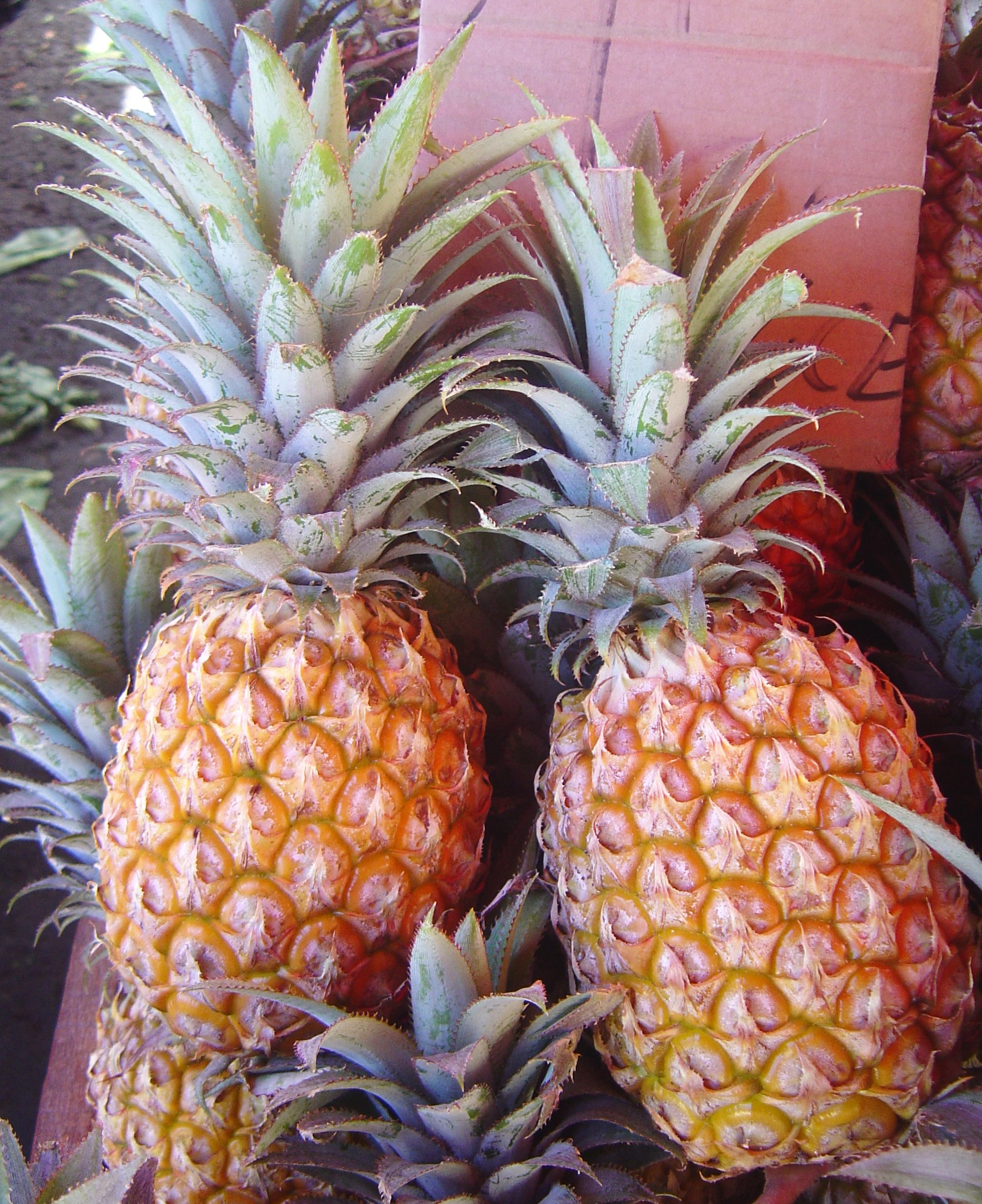 Ananas comosus 'Victoria' (Victoria pineapple) Île de la Réunion